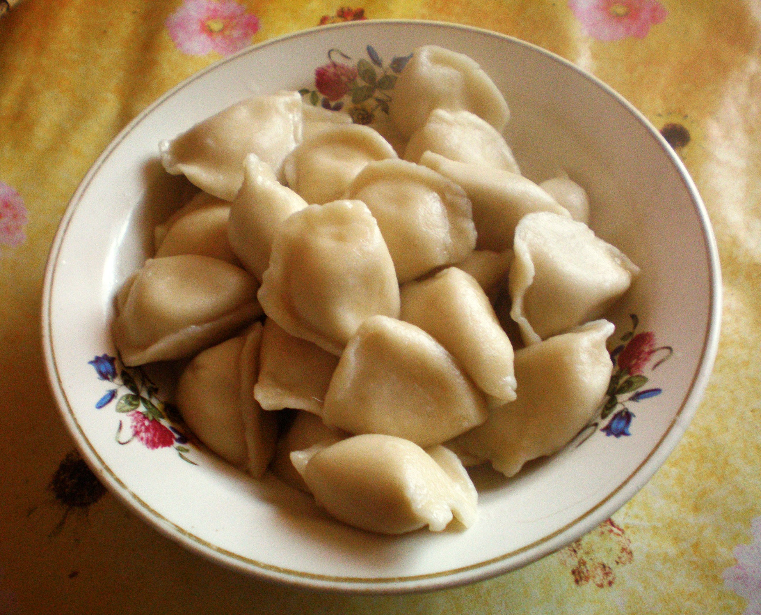 Virtiniai